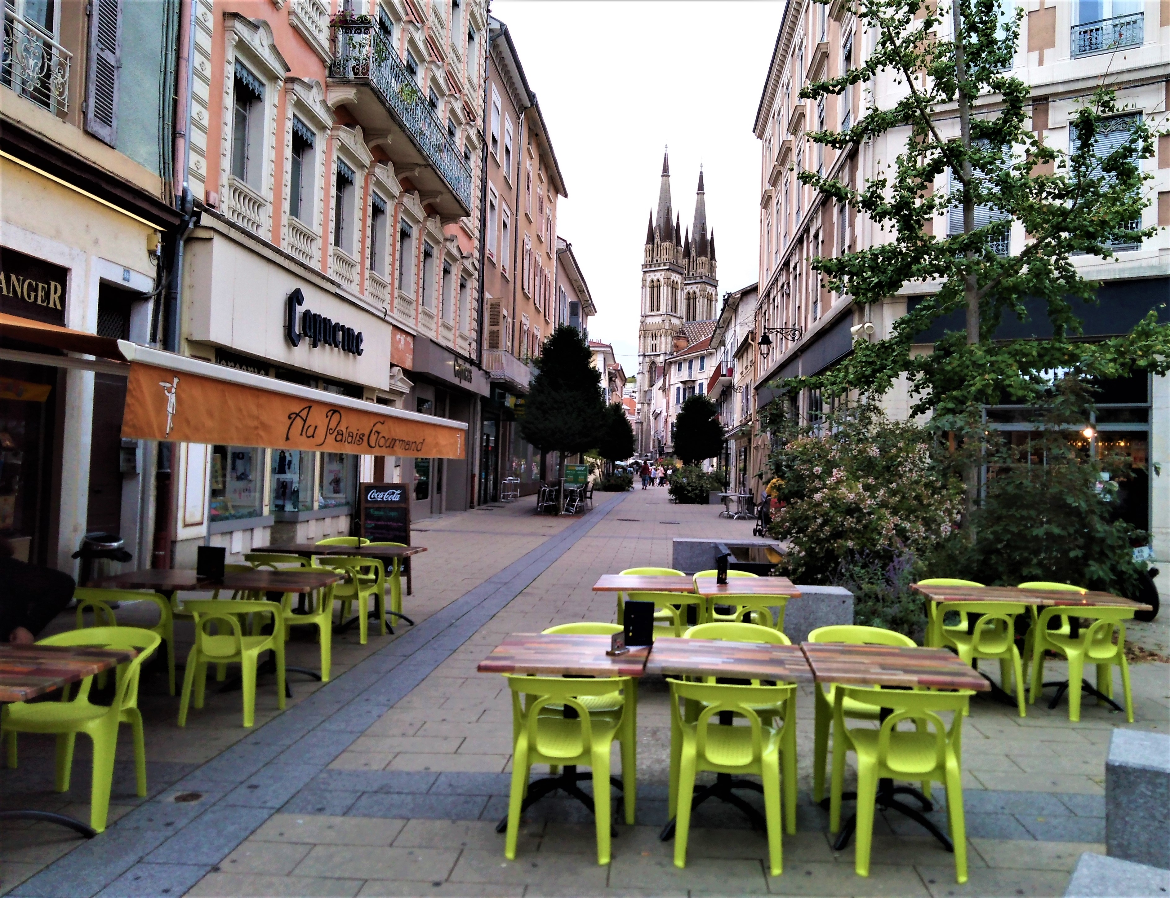 Rues piétonnes de Voiron (Adolphe Peronnet et Montgolfier)